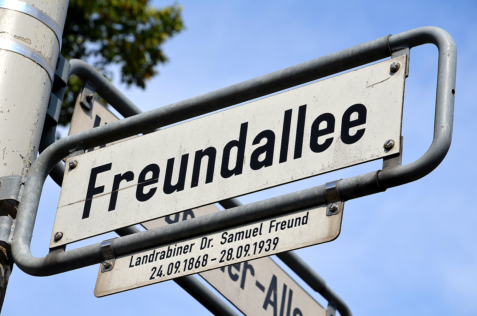 Straßenschild der Freundallee Ecke Hans-Böckler-Allee in Hannover mit gesonderter Legendentafel: „Landrabbiner Dr. Samuel Freund / 24. 09. 1968 - 28. 09. 1939“ ...